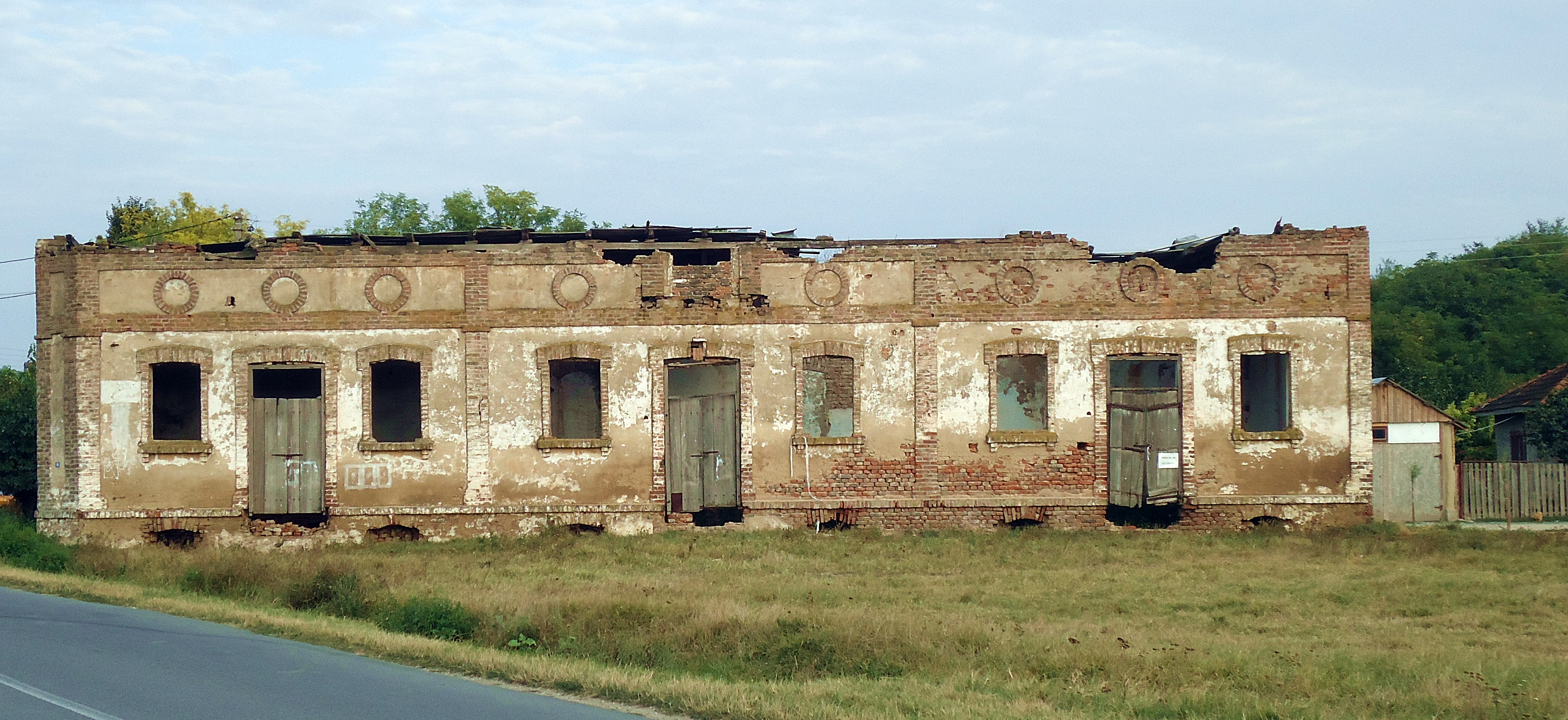 Anexă 02